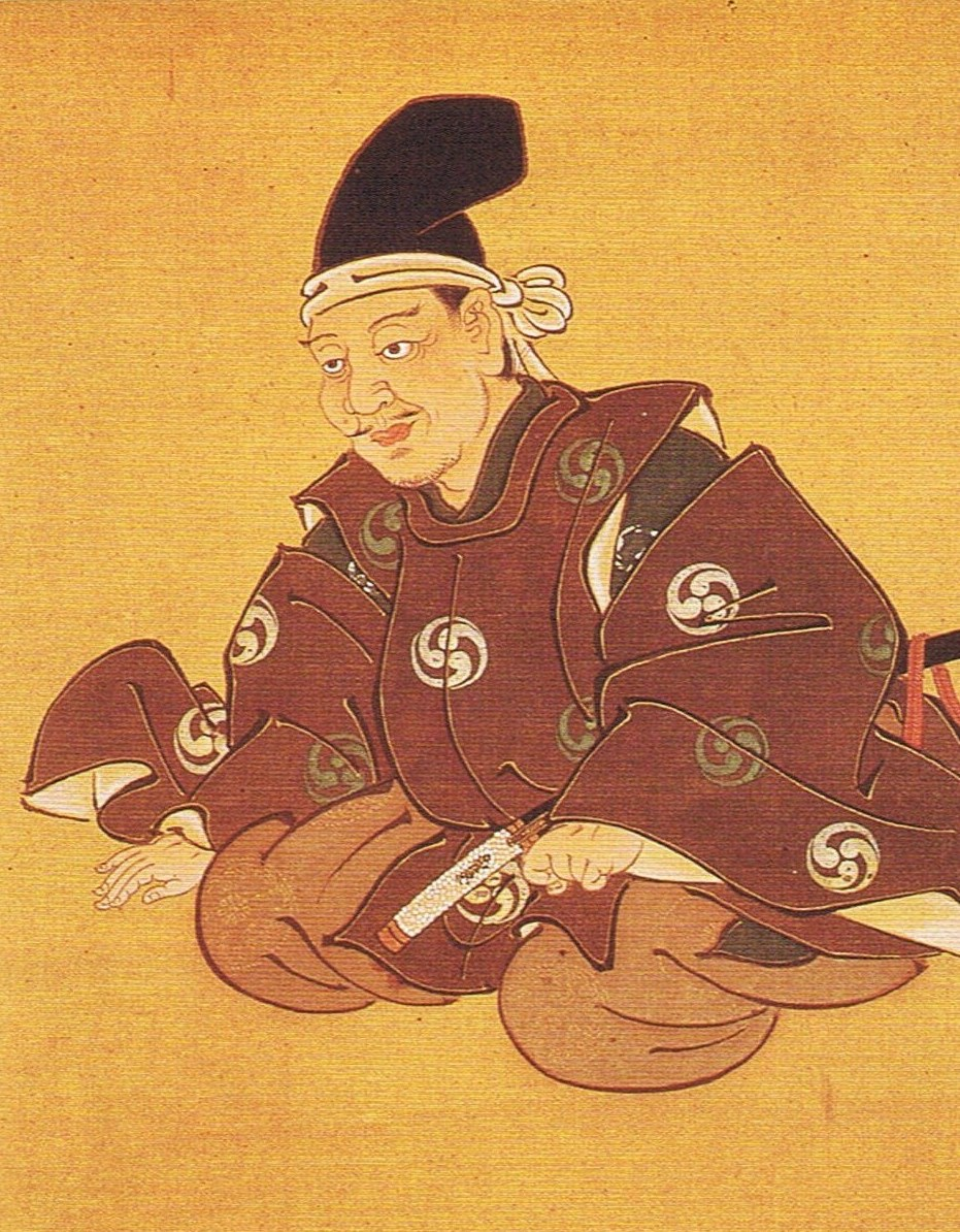 樋口兼光像。長野県木曾郡木曽町 徳音寺所蔵